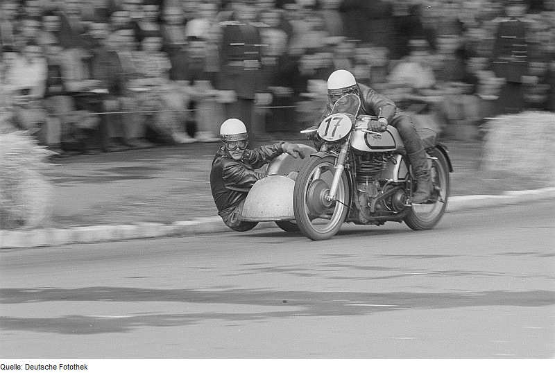 Original image description from the Deutsche FotothekNürnberger Rennfahrer Ebersberger und Strauß